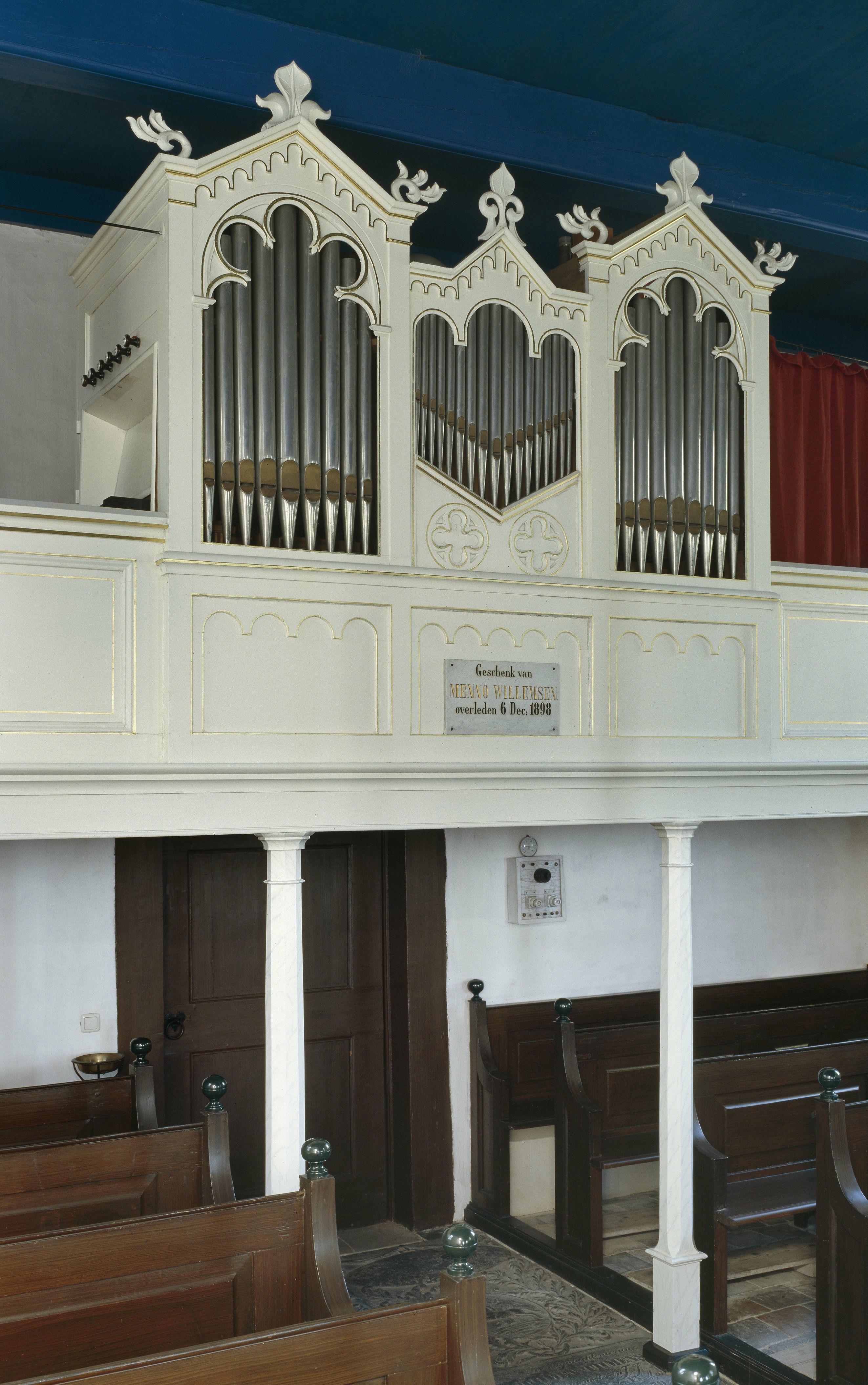 Voormalige Hervormde Kerk: Interieur, aanzicht orgel (opmerking: Gefotografeerd voor Het Historische Orgel in Nederland 1894-1901, bladzijde 238)